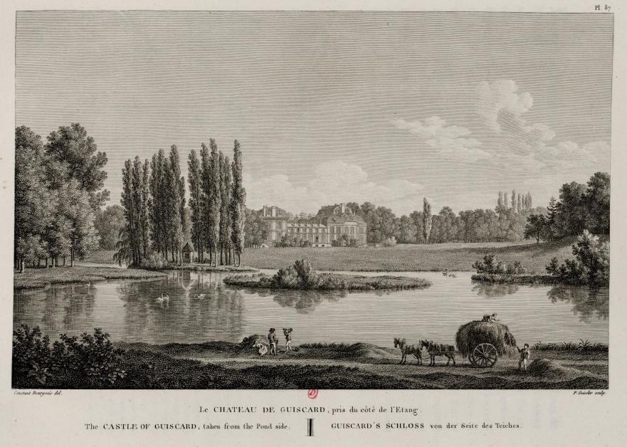 gravure du château du 19è siècle